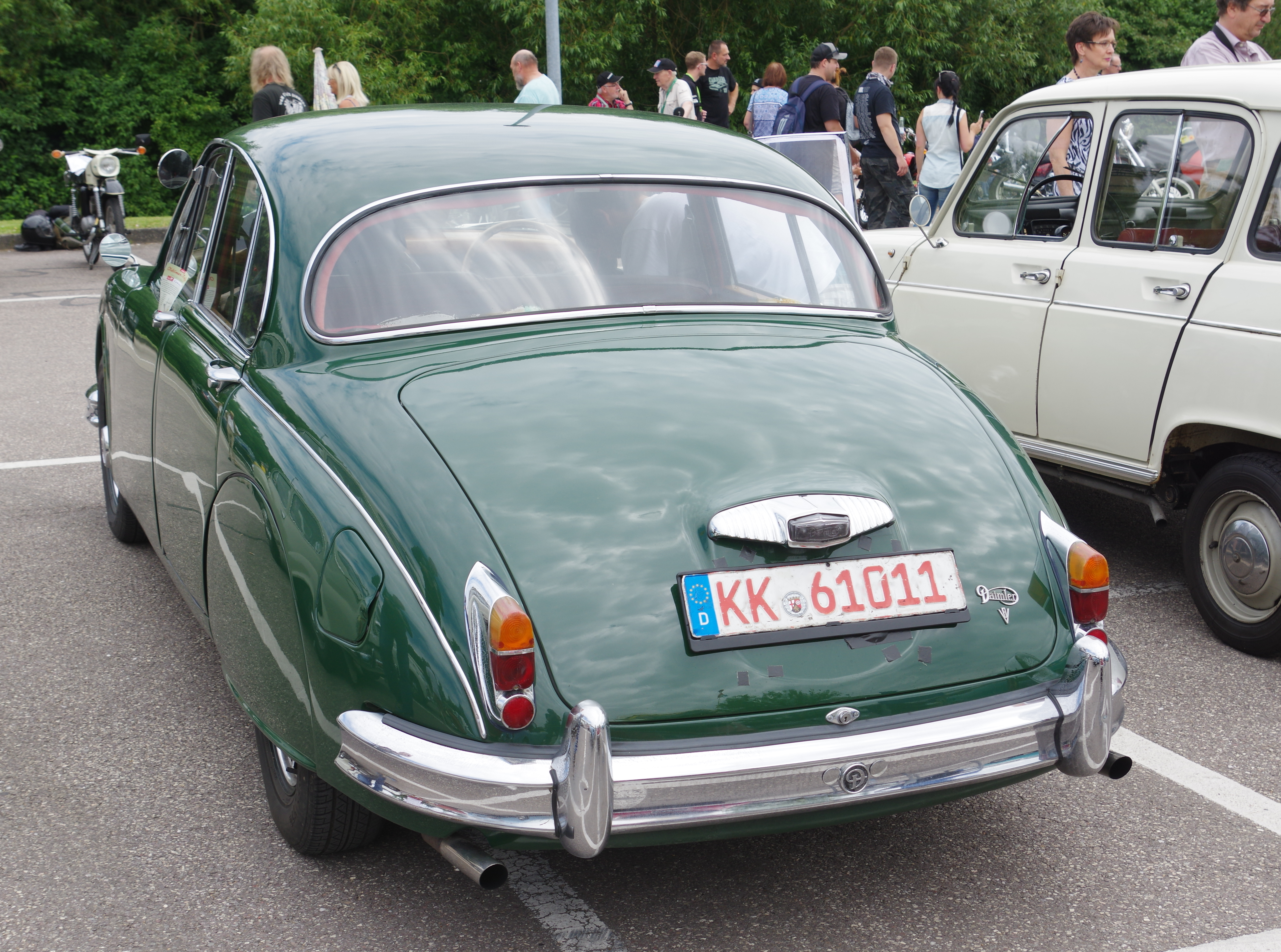 Daimler V8 250, 32. Internationales Oldtimer Treffen Konz 2016, Das Nummernschild ist verfälscht!